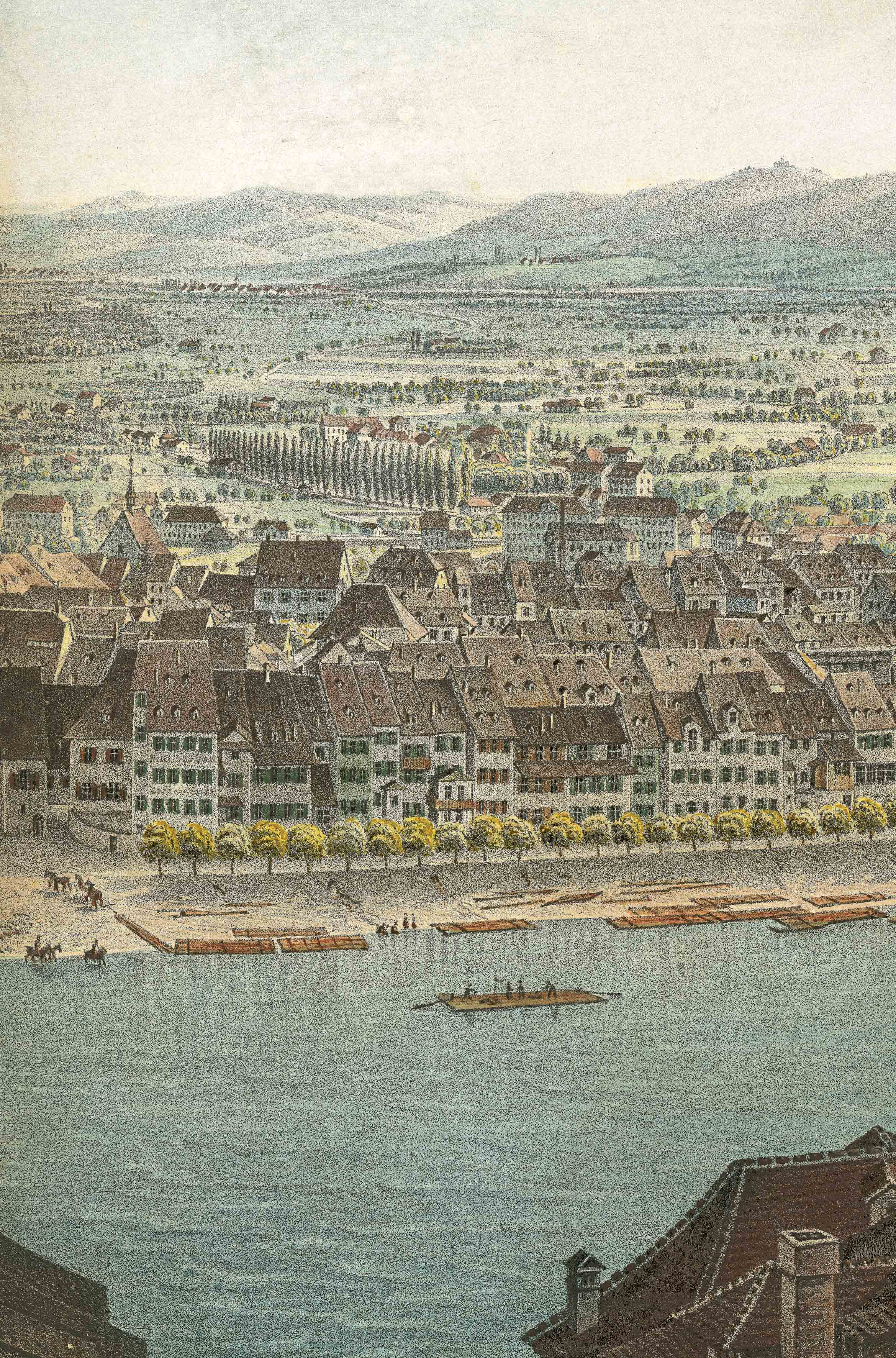 Blick auf Kleinbasel um 1842, Federzeichnung von Anton Winterlin